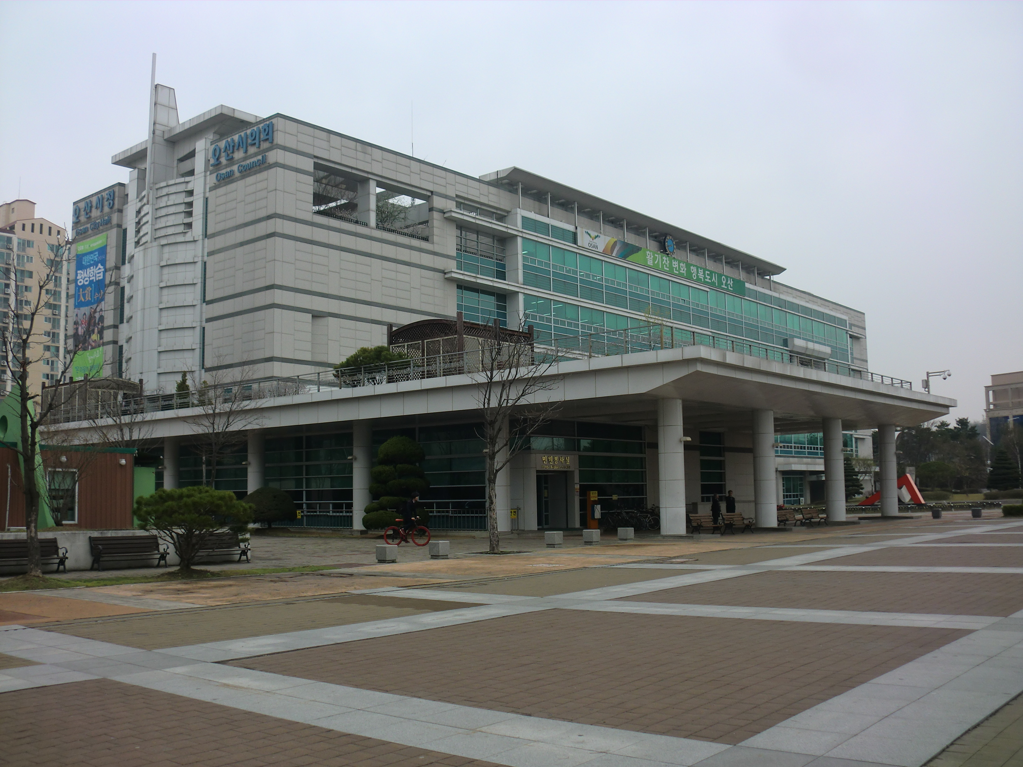 경기도 오산시에 있는 오산시청